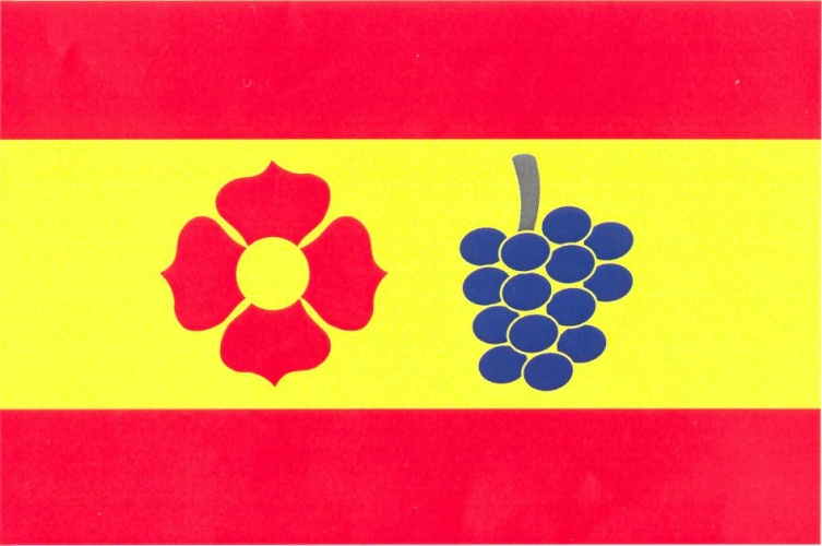 vlajka, Radotín, okres Přerov